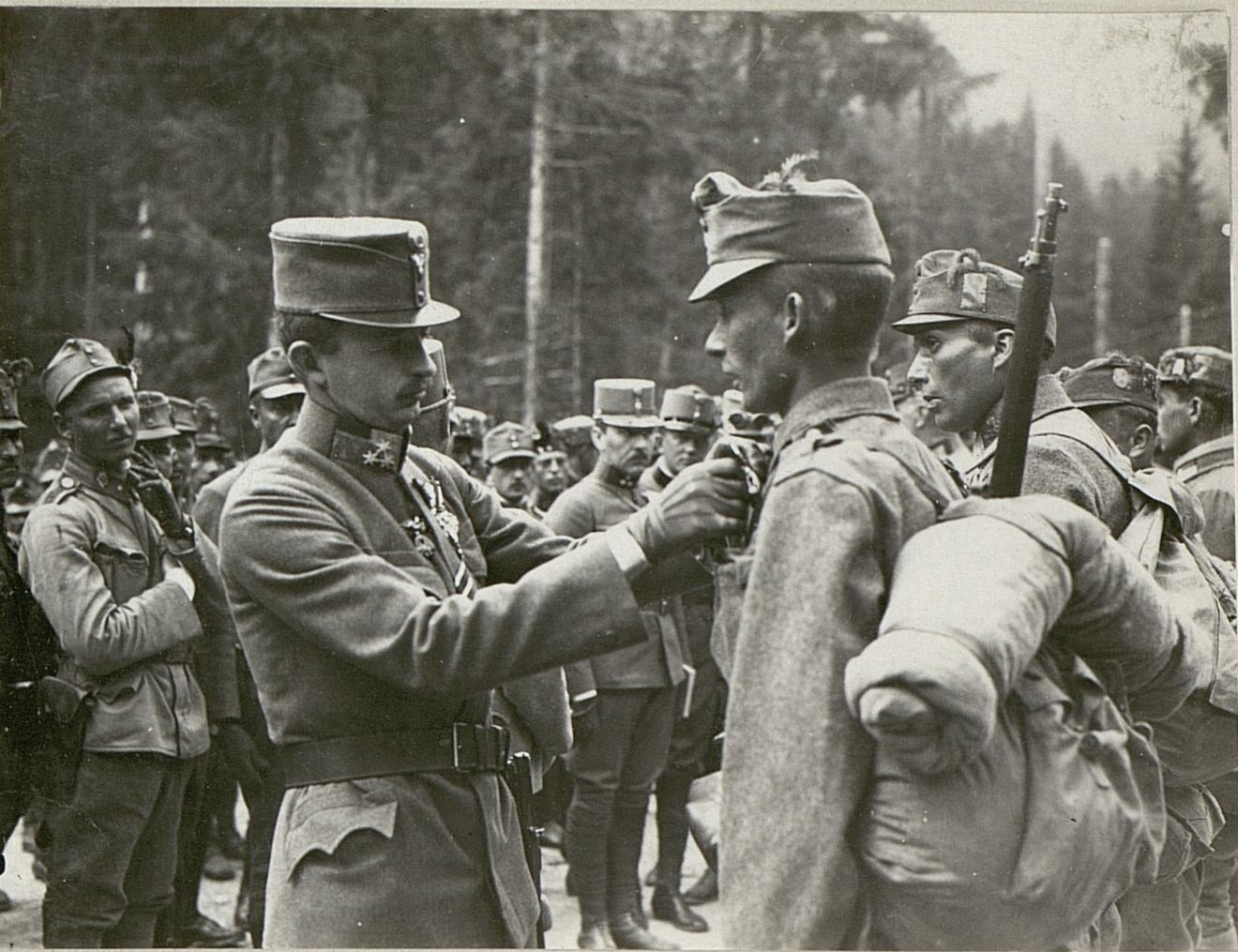 Besuch Sr, Majestät Kaiser Karl in Baitle